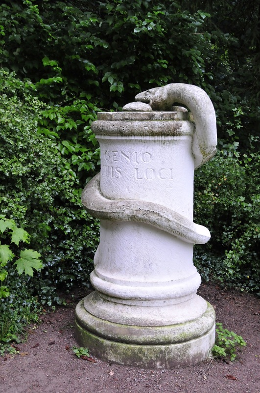 Original image description from the Deutsche Fotothek Weimar mit seinen zahlreichen Erinnerungsstätten an die klassische deutsche Literatur ist ein international bedeutsames Touristenziel. Bild: der Schlangenstein im Park an der Ilm